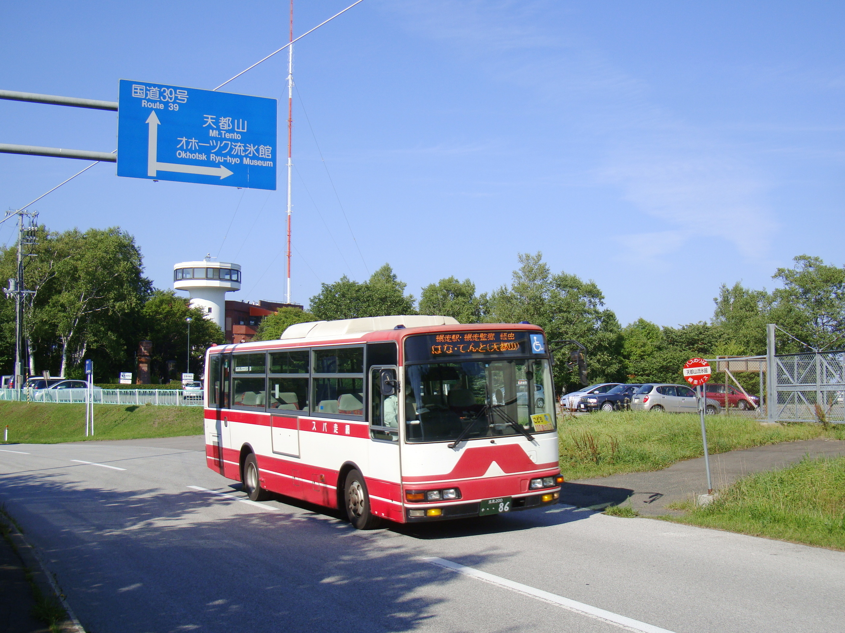 Abashiri sightseeing line